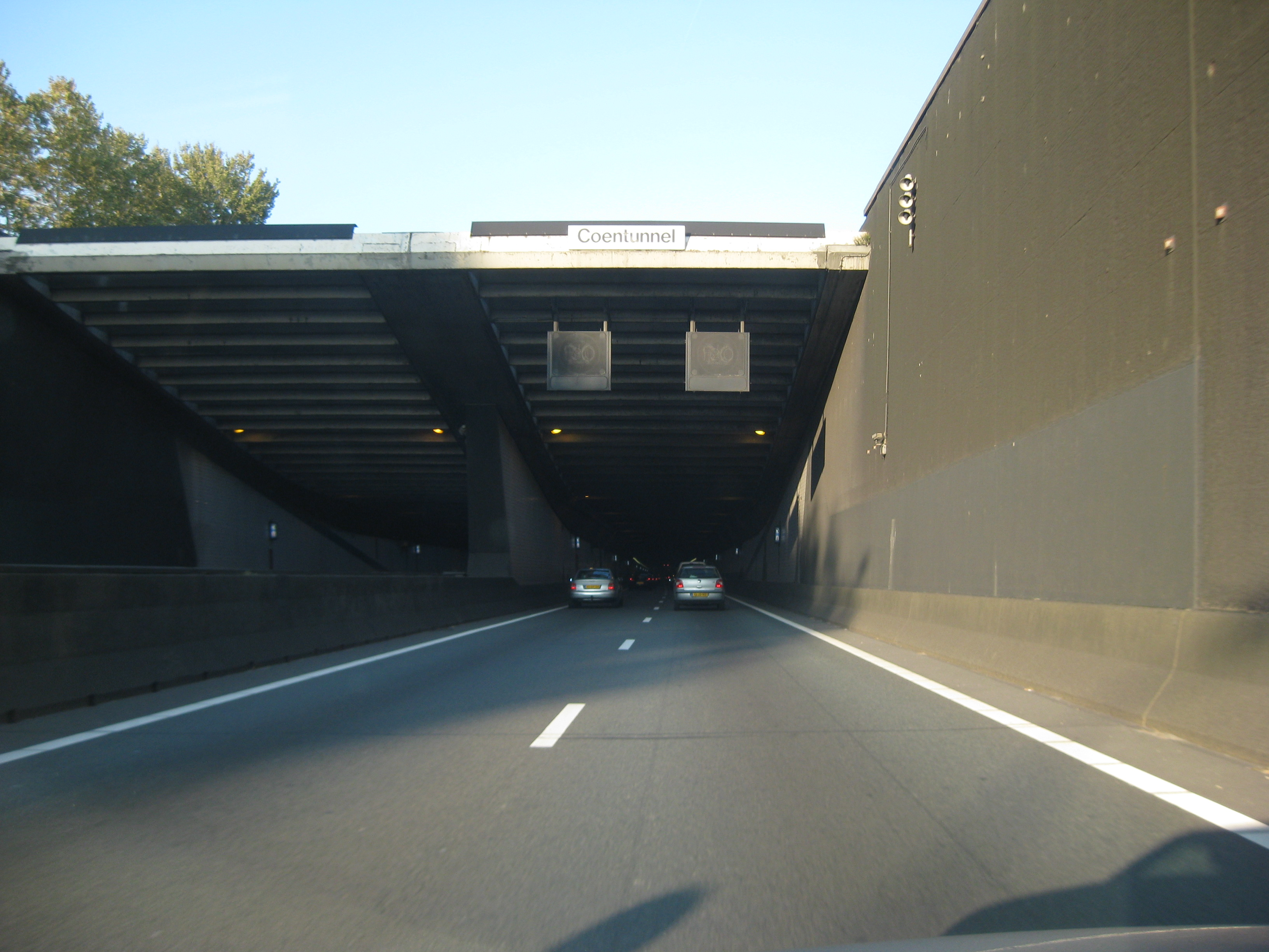 Ingang oostbuis Coentunnel